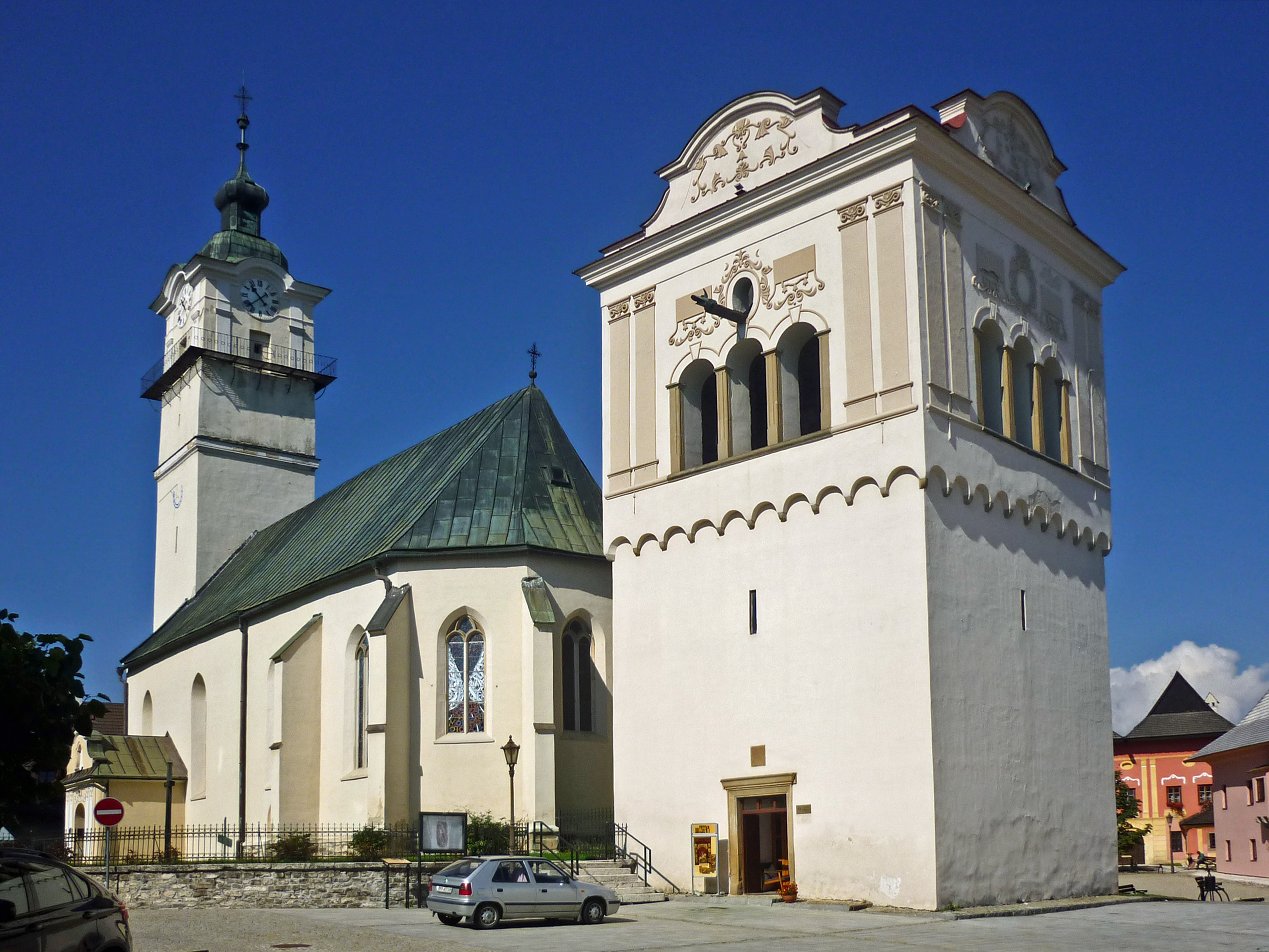 Georgenkirche mit Glockenturm am Ring (Sobotské nám.) in Spišská Sobota (Georgenberg), OT von Poprad in der Slowakei